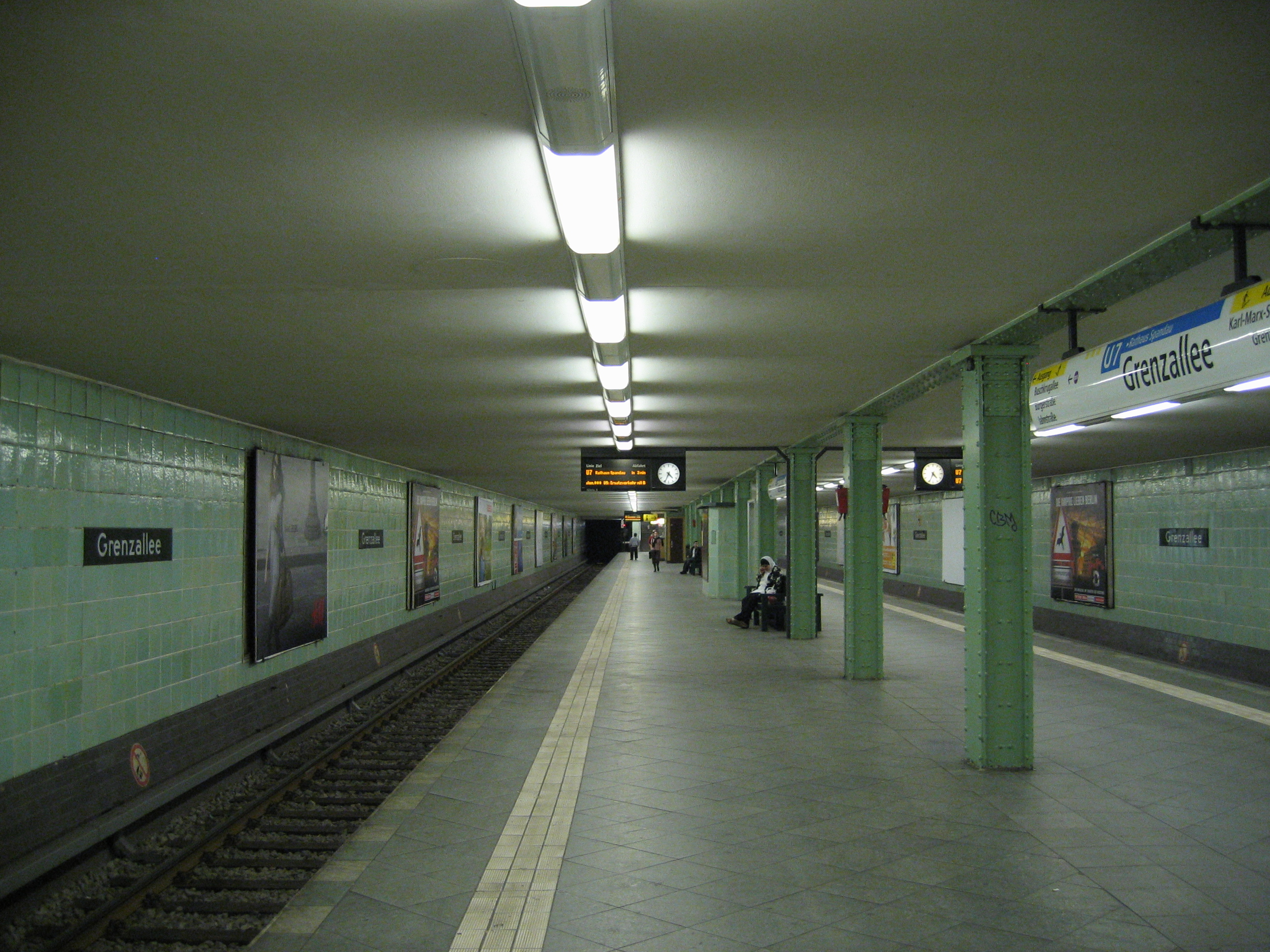 U-Bahnhof Grenzallee, Berlin